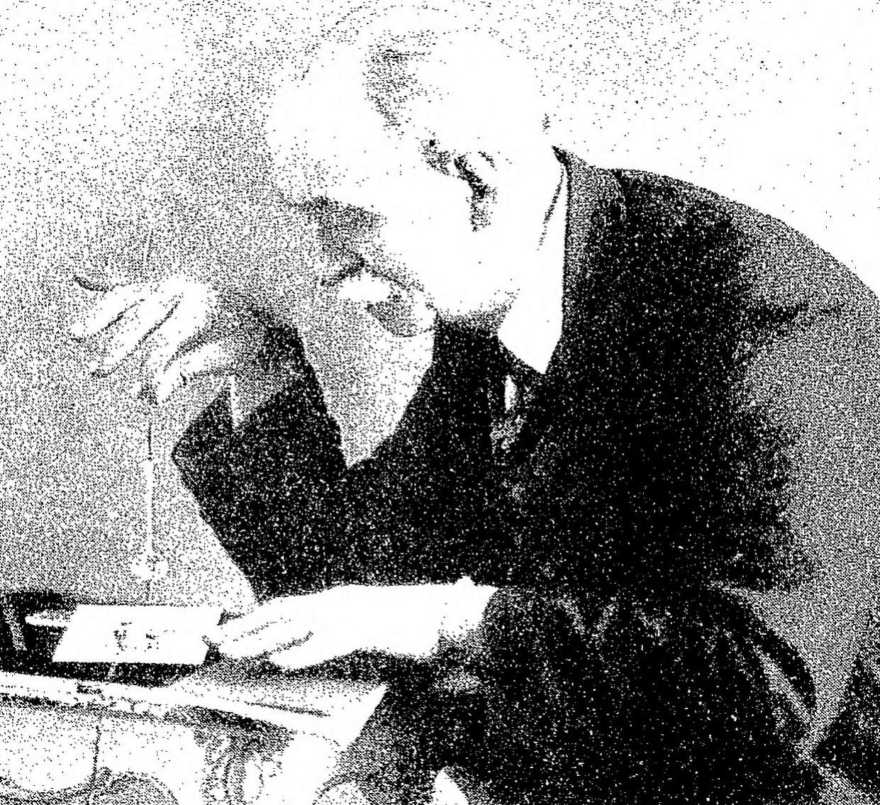 Démonstration de "polarisation humaine" par M. A. Bovis, radiesthésiste.